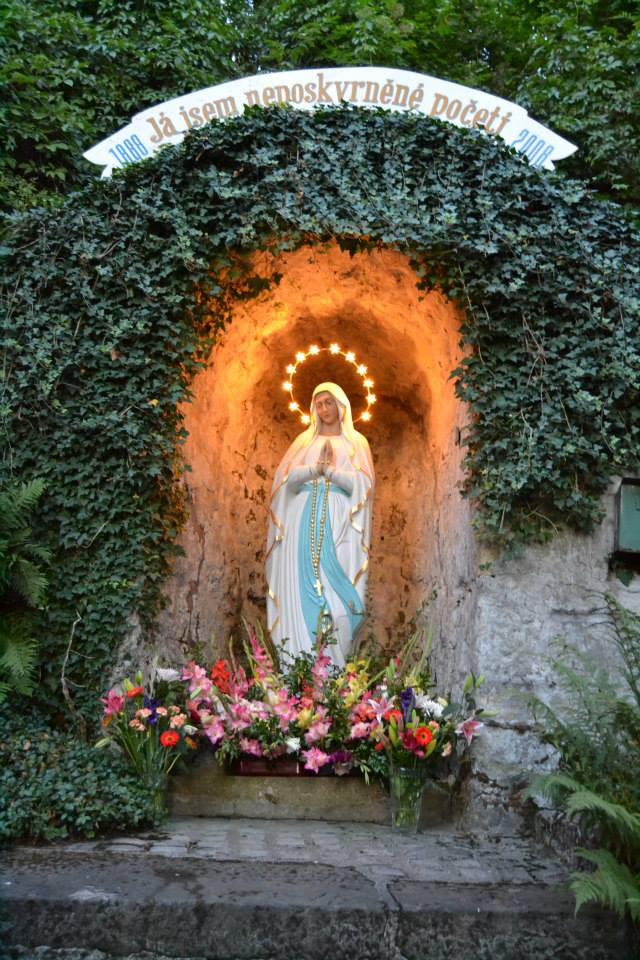 Petřkovice - jeskynní kaple Panny Marie Lourdské